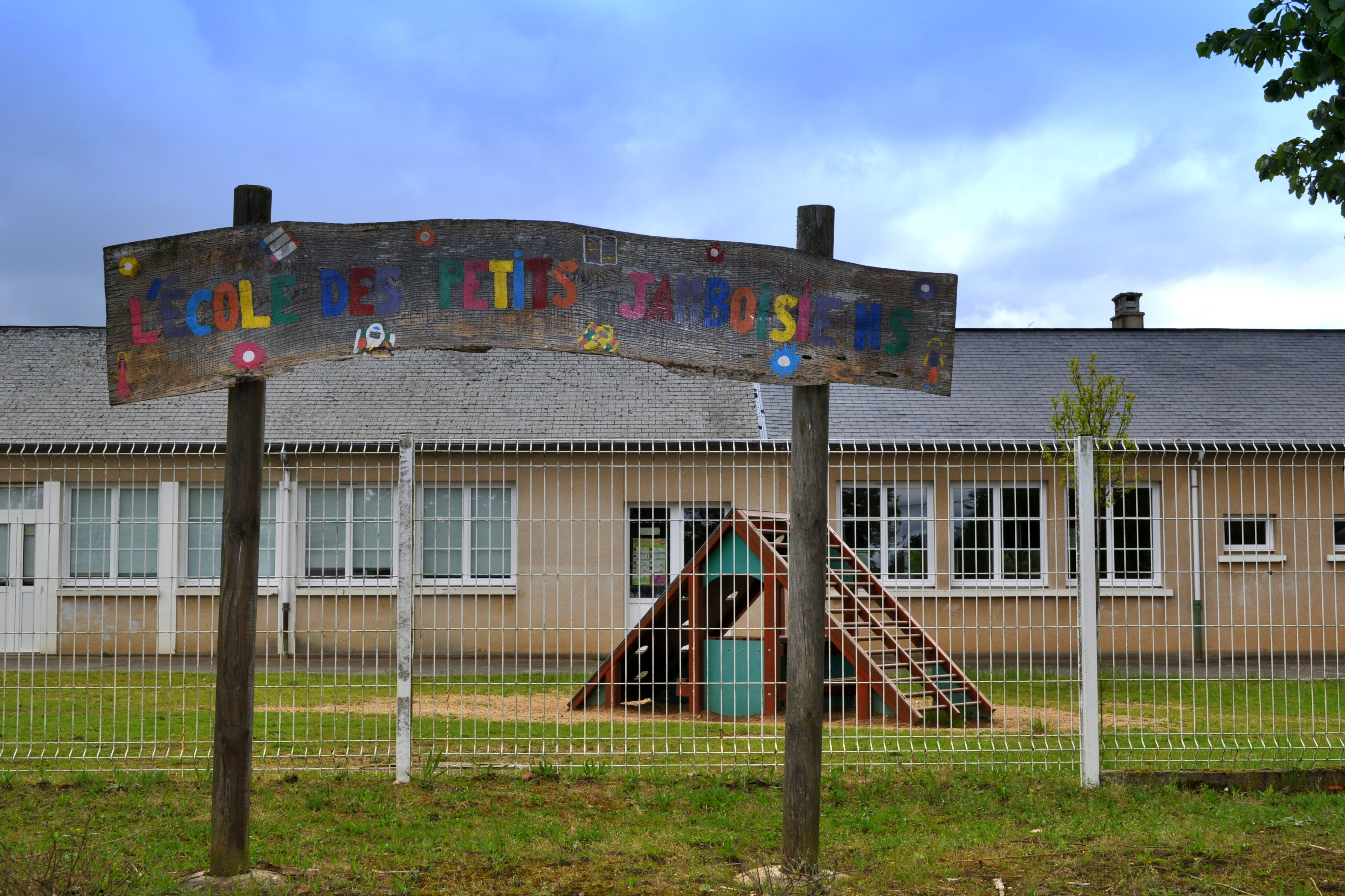 Ecole de Saint-Jean-du-Bois (Sarthe)